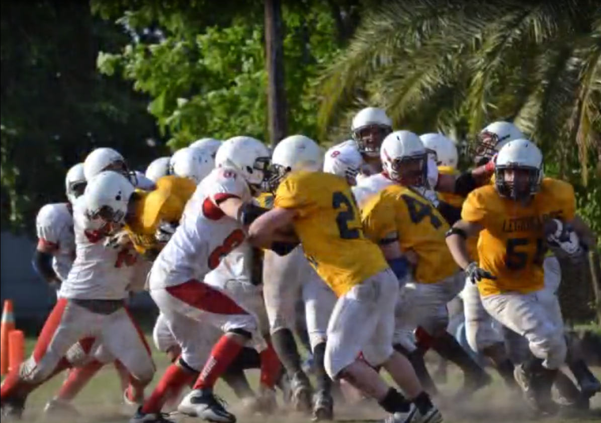 ¡Corsini, QB do Legionarios, pela vitoria!